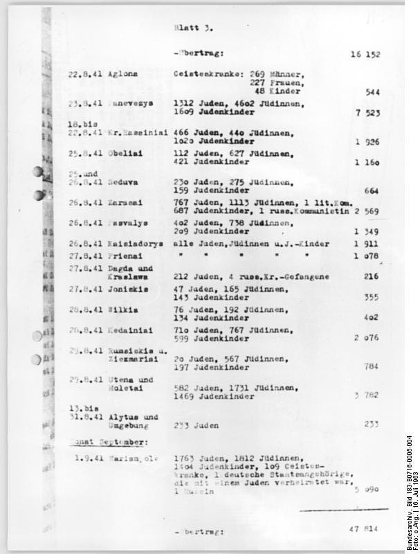 Oberstes Gericht, Globke-Prozess, Beweisstück Zentralbild 16.7.1963 Dokumente über faschistische Greuel aus der UdSSR. UBz: Reproduktion der auszugsweise während des 7. Verhandlungstages des Globke-Prozesses am 15. Juli verlesenen Dokumente über faschistische Greuel in der Sowjetunion. Pedantisch genau zieht hier ein SS-Standartenführer Jäger die grausige Bilanz: "In Litauen gibt es keine Juden mehr." (siehe auch 2, 3 u. 5 - 10N)